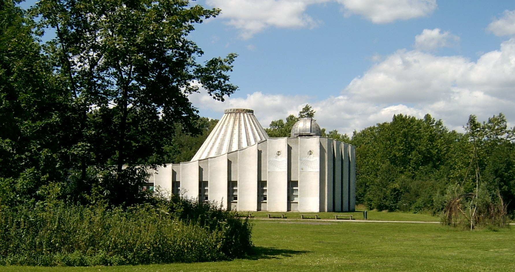 Raumflug-Planetarium „Sigmund Jähn“ auf der Peißnitz in Halle (Saale).